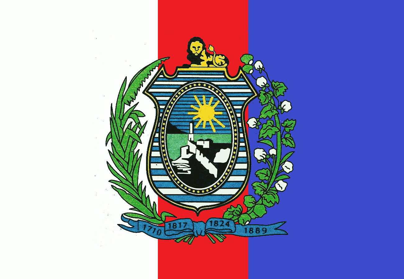 Bandeira do Governador de Pernambuco.